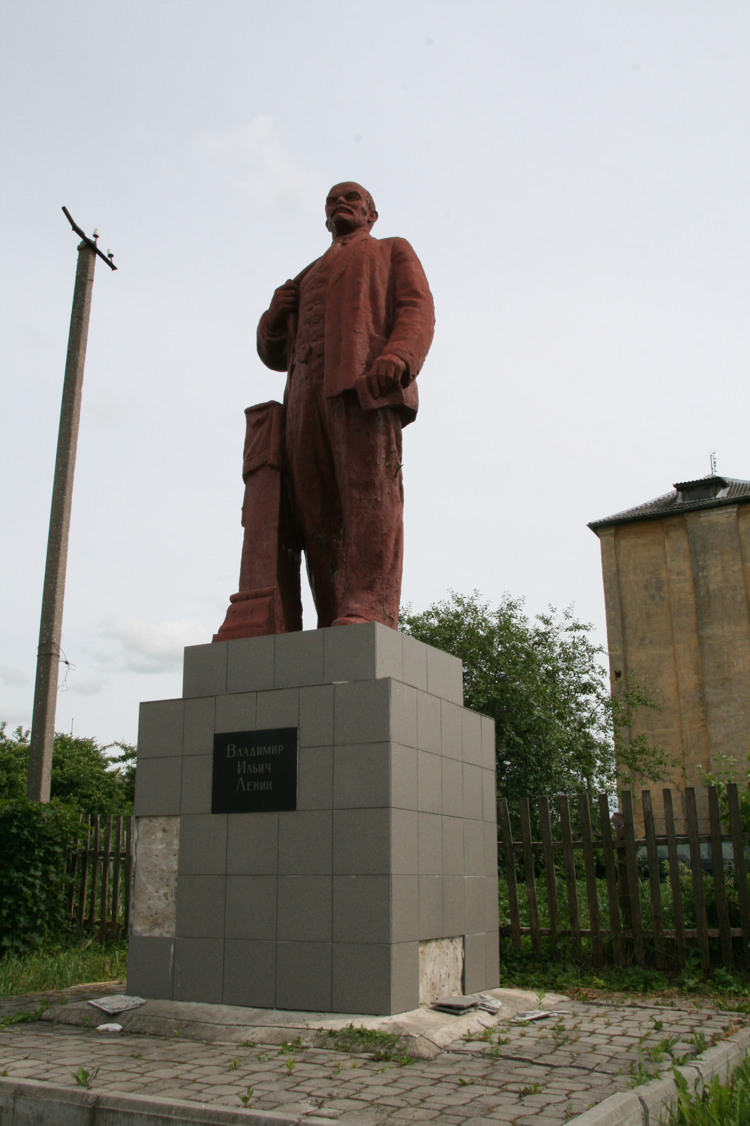 Lenindenkmal Железнодорожный / Schelesnodoroschny (Gerdauen)